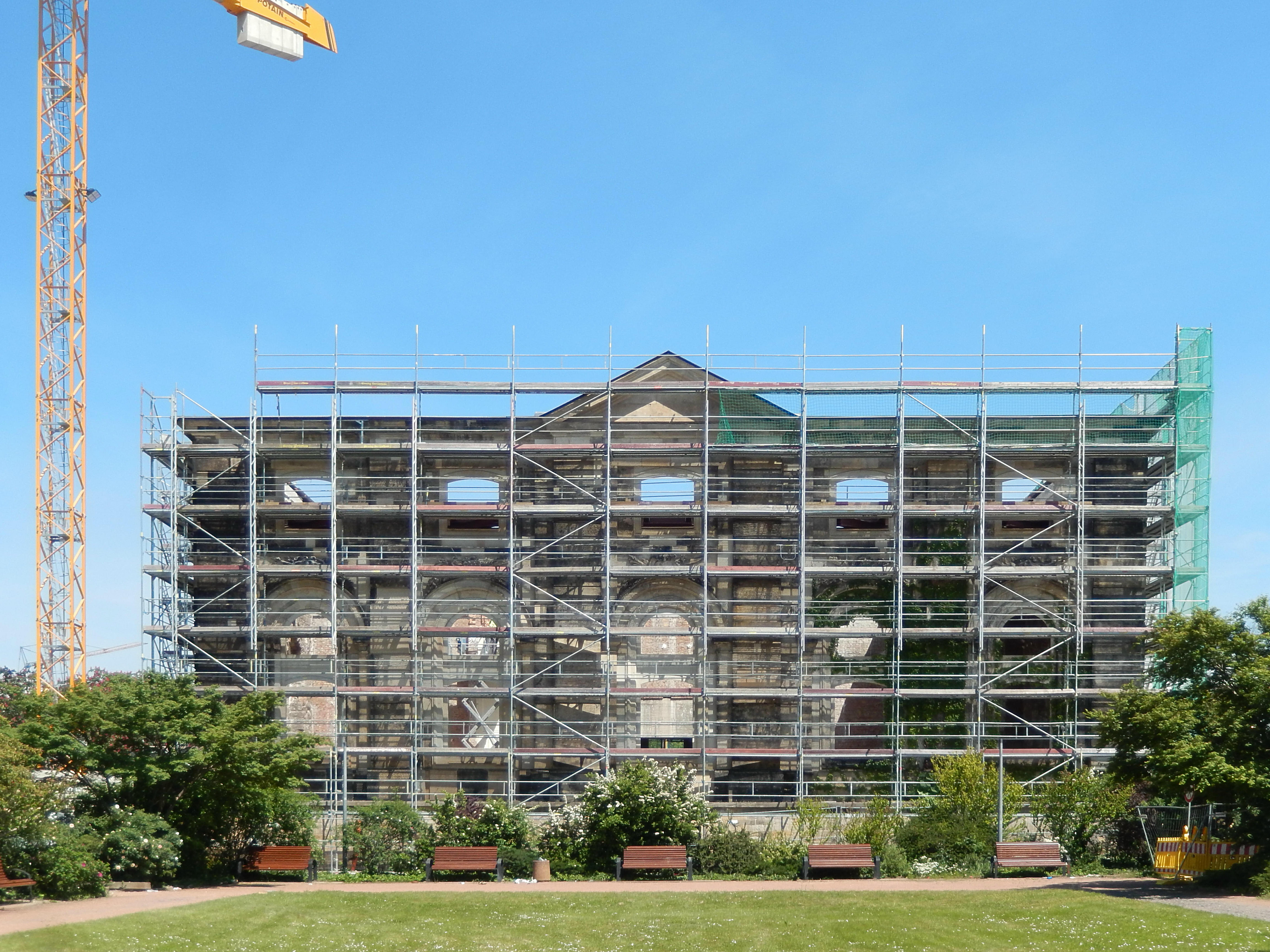 Dresden: Das Blockhaus - Als Blockhaus wird in Dresden die Neustädter Wache an der Westseite des Neustädter Brückenkopfes der Augustusbrücke bezeichnet. Das freistehende Gebäude befindet sich am Neustädter Markt, wenige Meter vom Goldenen Reiter entfernt. Den Namen Blockhaus erhielt es vermutlich aus zwei Gründen, und zwar wegen seiner würfelähnlichen Bauform und wegen seiner ursprünglichen Nutzung als Kontroll- und Zollstation. Der Architekt war Zacharias Longuelune. Das Gebäude soll für 20 Millionen Euro saniert werden, um danach das Archiv der Avantgarden des 20. Jahrhunderts des Kunstsammlers Egidio Marzona aufzunehmen.